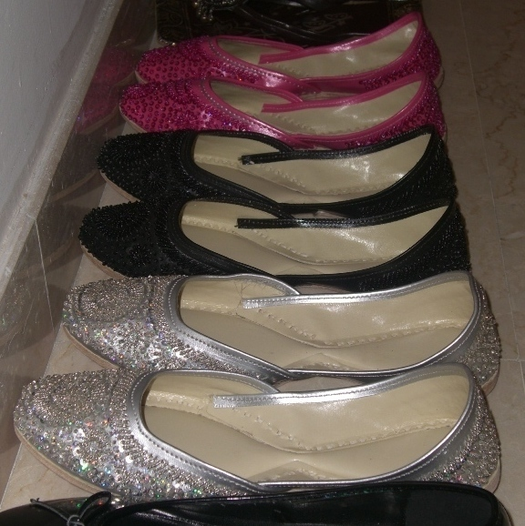 Jutti Indian shoes